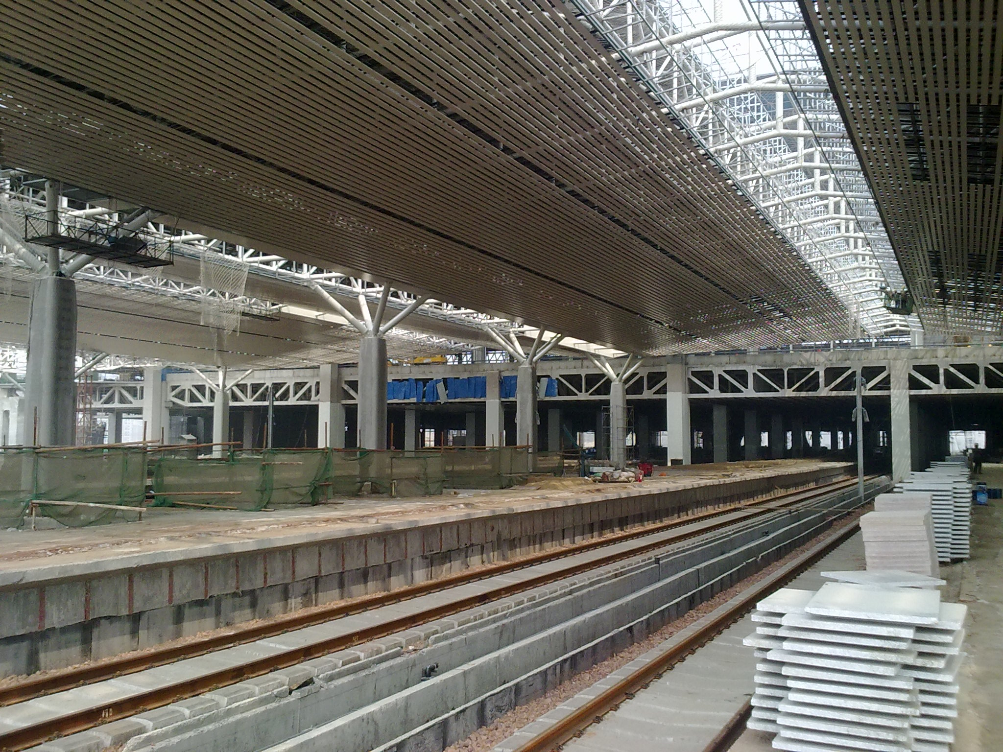 郑州东站站台（建设中）